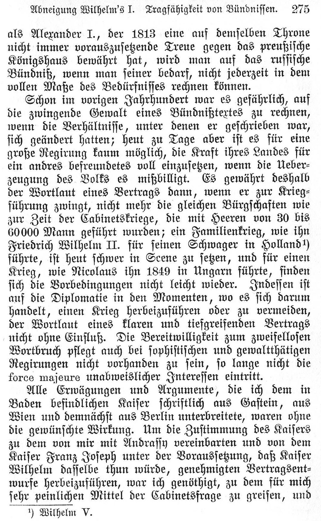 Uit een boek van 1905 (Gedanken und Erinnerungen von Otto Fürst von Bismarck, Zweiter Band (Stuttgart u. Berlin, Gotta'sche Buchhandlung); Bismarck zelf overleed in 1898